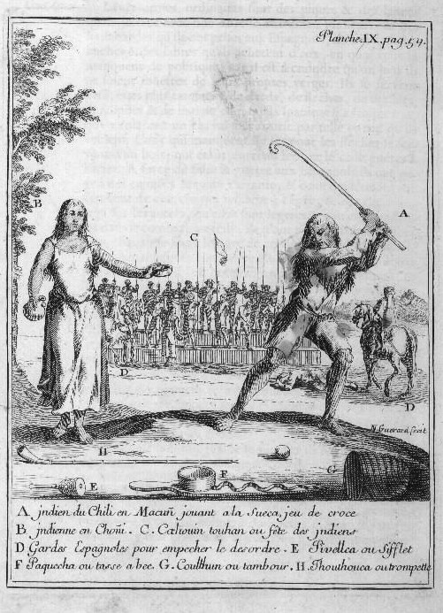 Illustrations de Relation du voyage de la mer du Sud aux côtes du Chili et du Pérou fait pendant les années 1712, 1713, et 1714 / N. Guérard, Amédée François Frézier, dess. ; Fonbonne, J-B Scotin, grav. ; Amédée François Frézier, aut. du texte